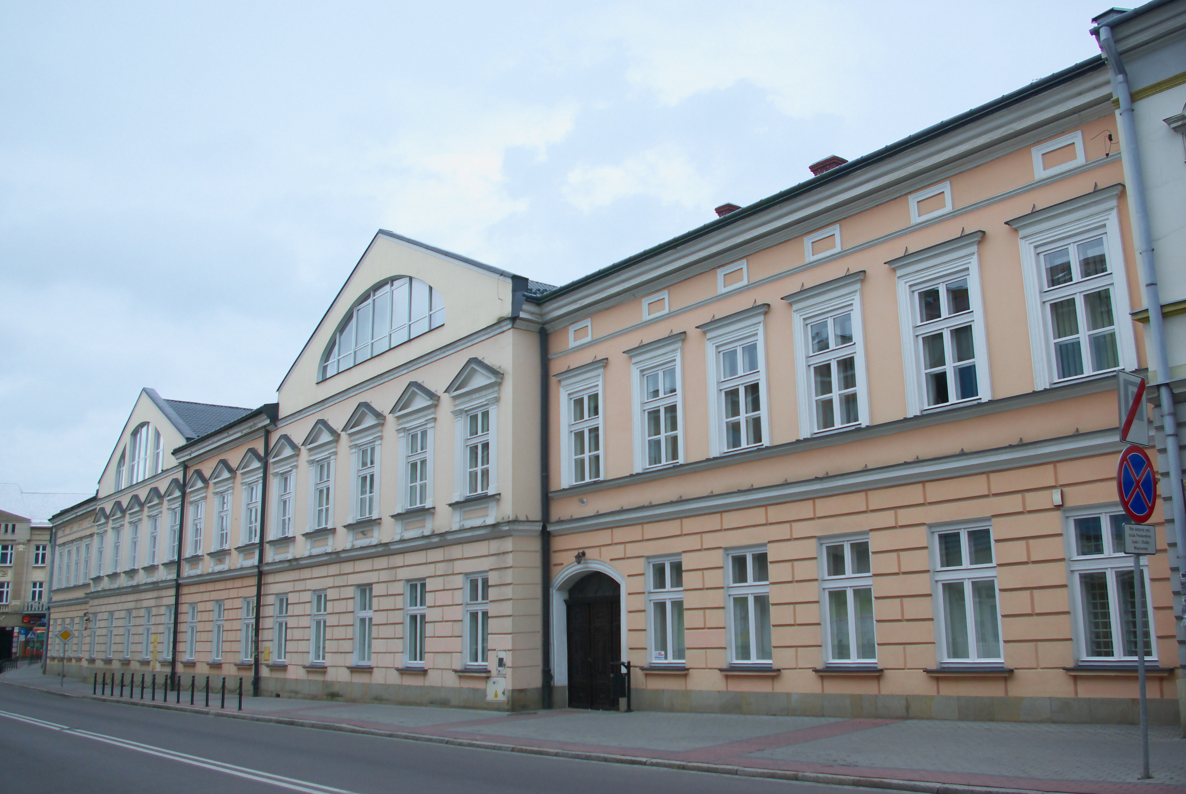 Budynek sądu przy ulicy Tadeusza Kościuszki 3 w Sanoku